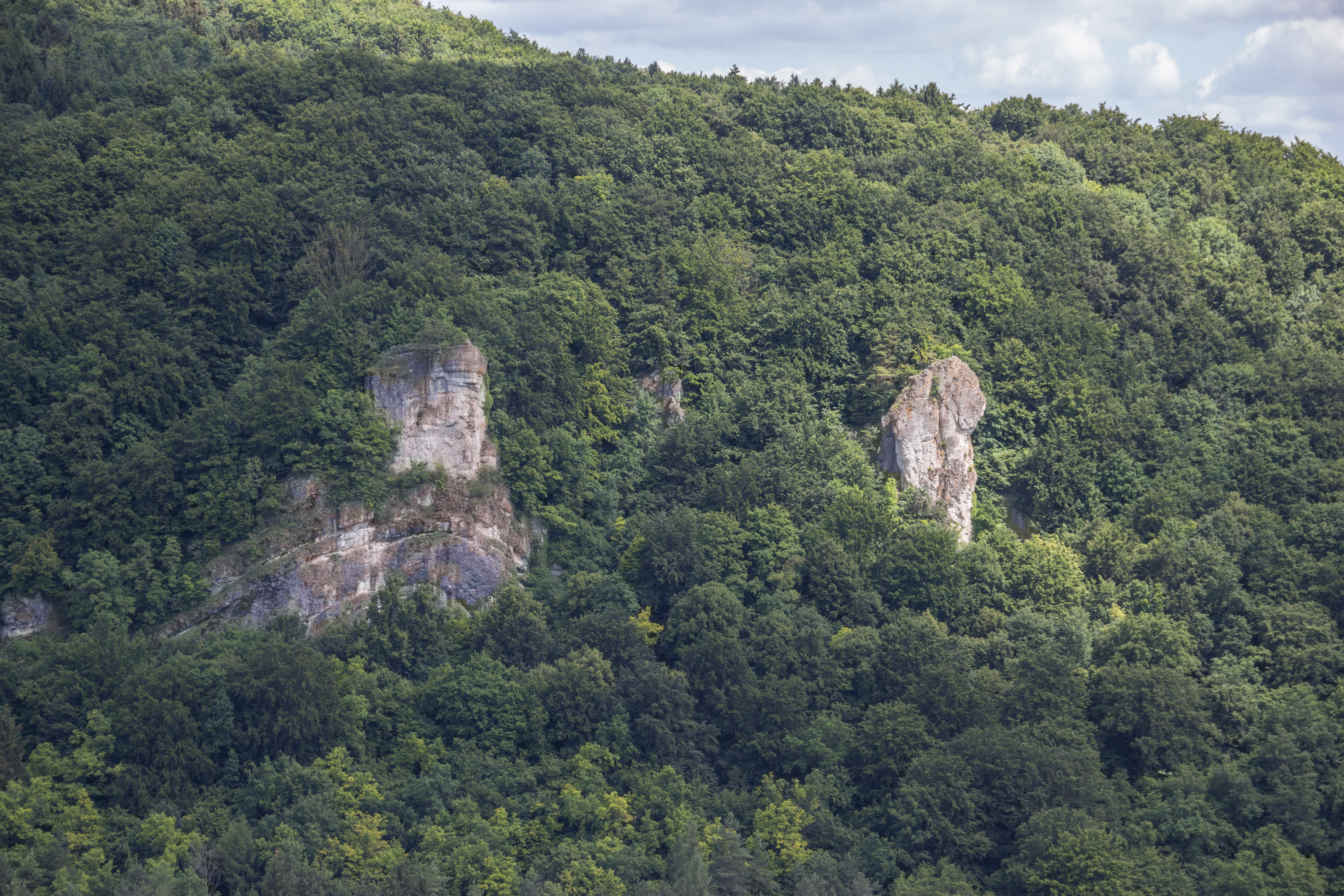 Geotop Müllerfelsen (474R076), Naturpark und Landschaftsschutzgebiet Fränkische Schweiz-Veldensteiner Forst, Streitberg